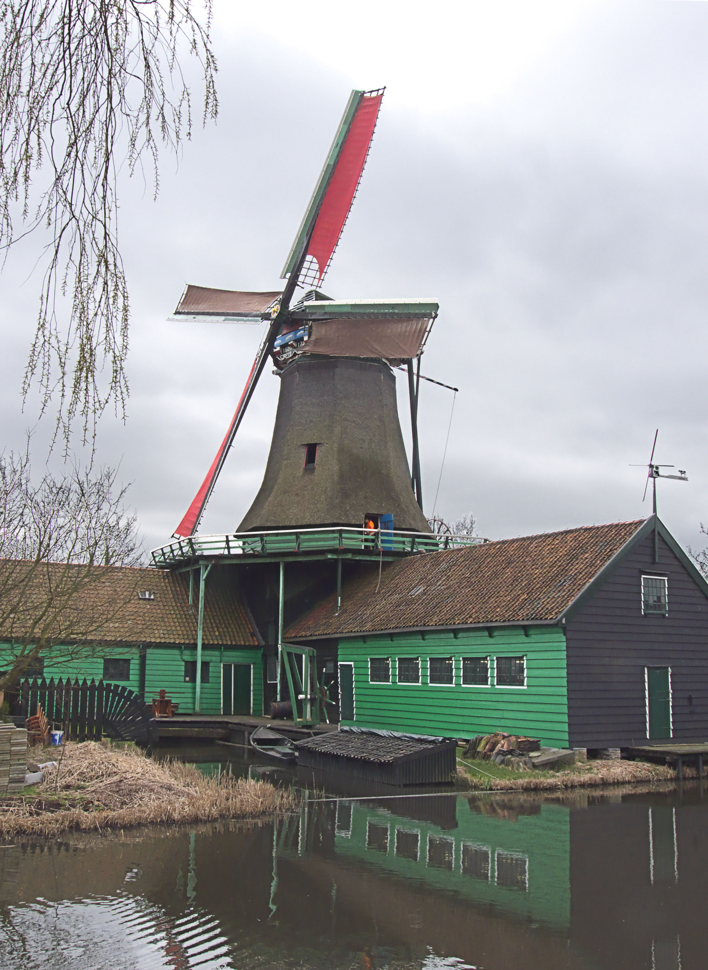 Molen Het Pink